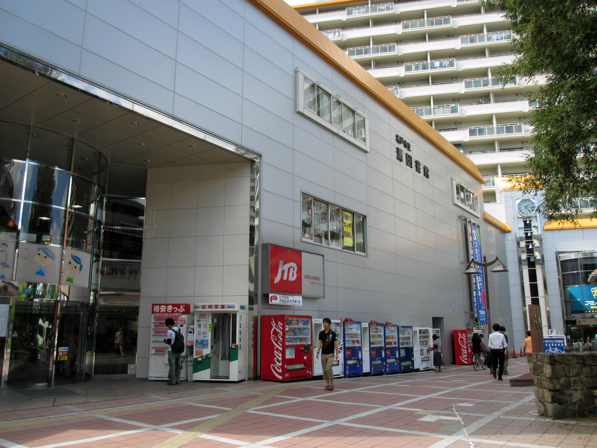 Foresta Rokko